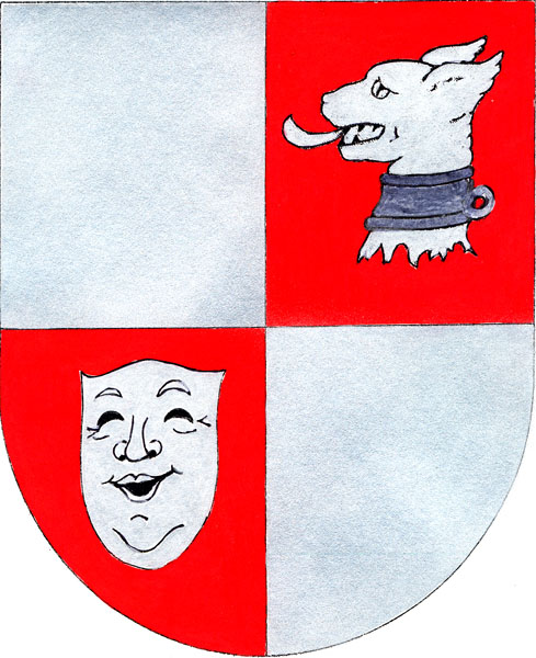 Znak obce Žihobce